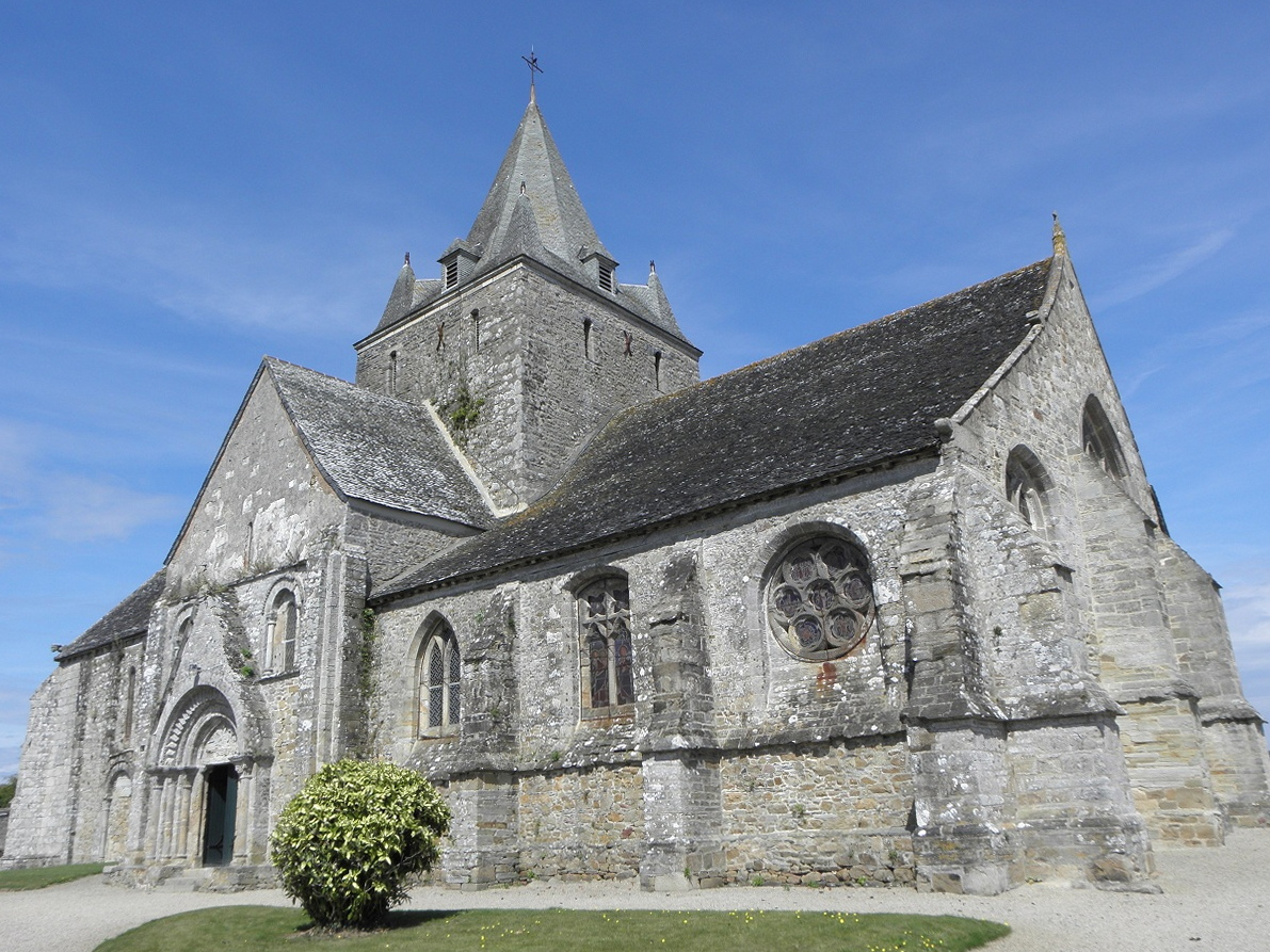 Flanc méridional et chevet de la chapelle ND de Kernitron en Lanmeur (29).